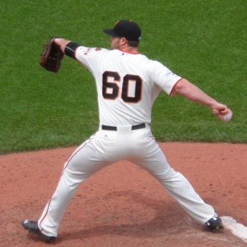 Hunter Strickland